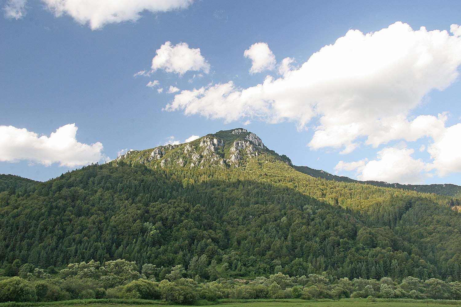 Šíp (1169 m) - pohled od obce Rojkov